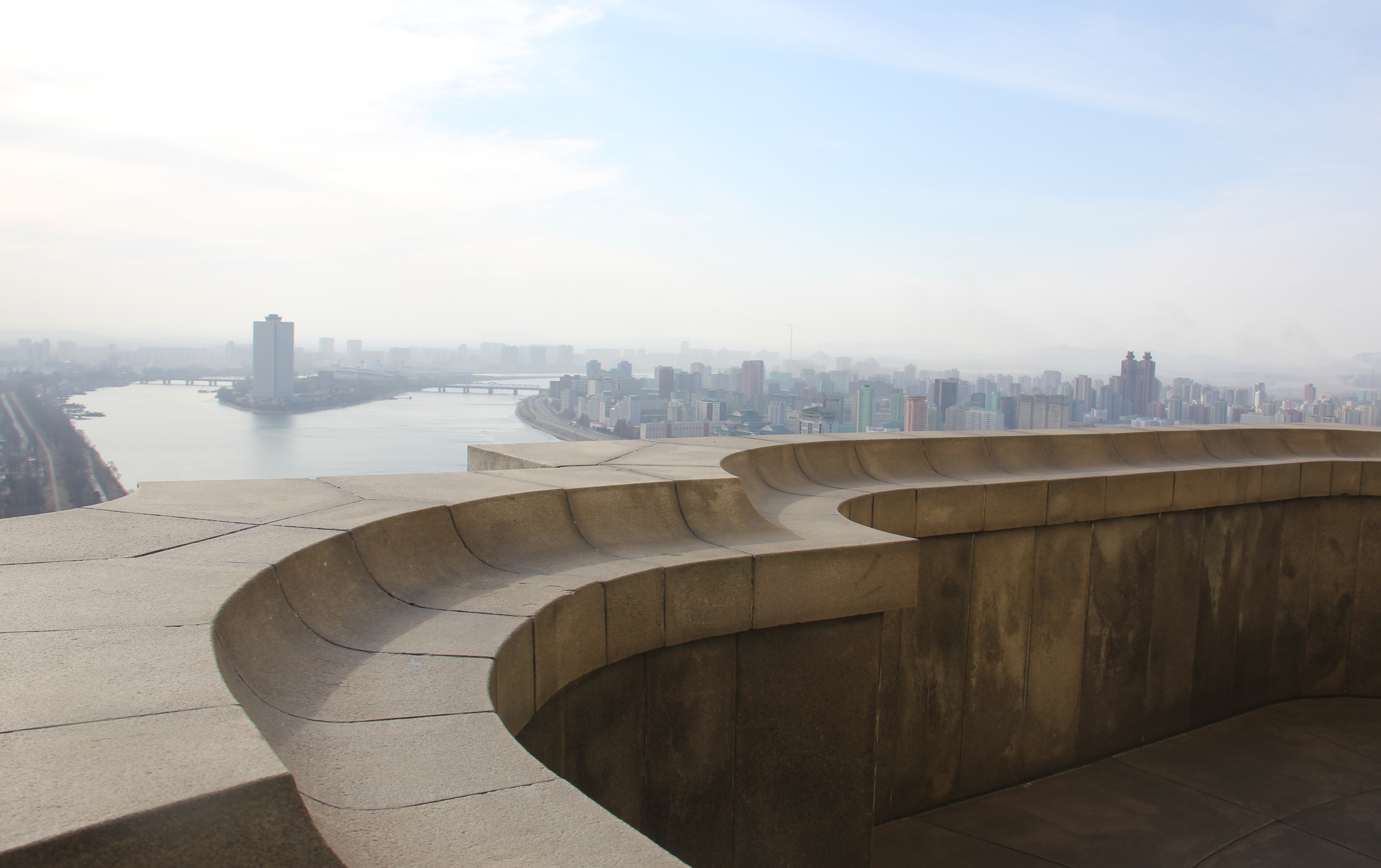 Juche Tower